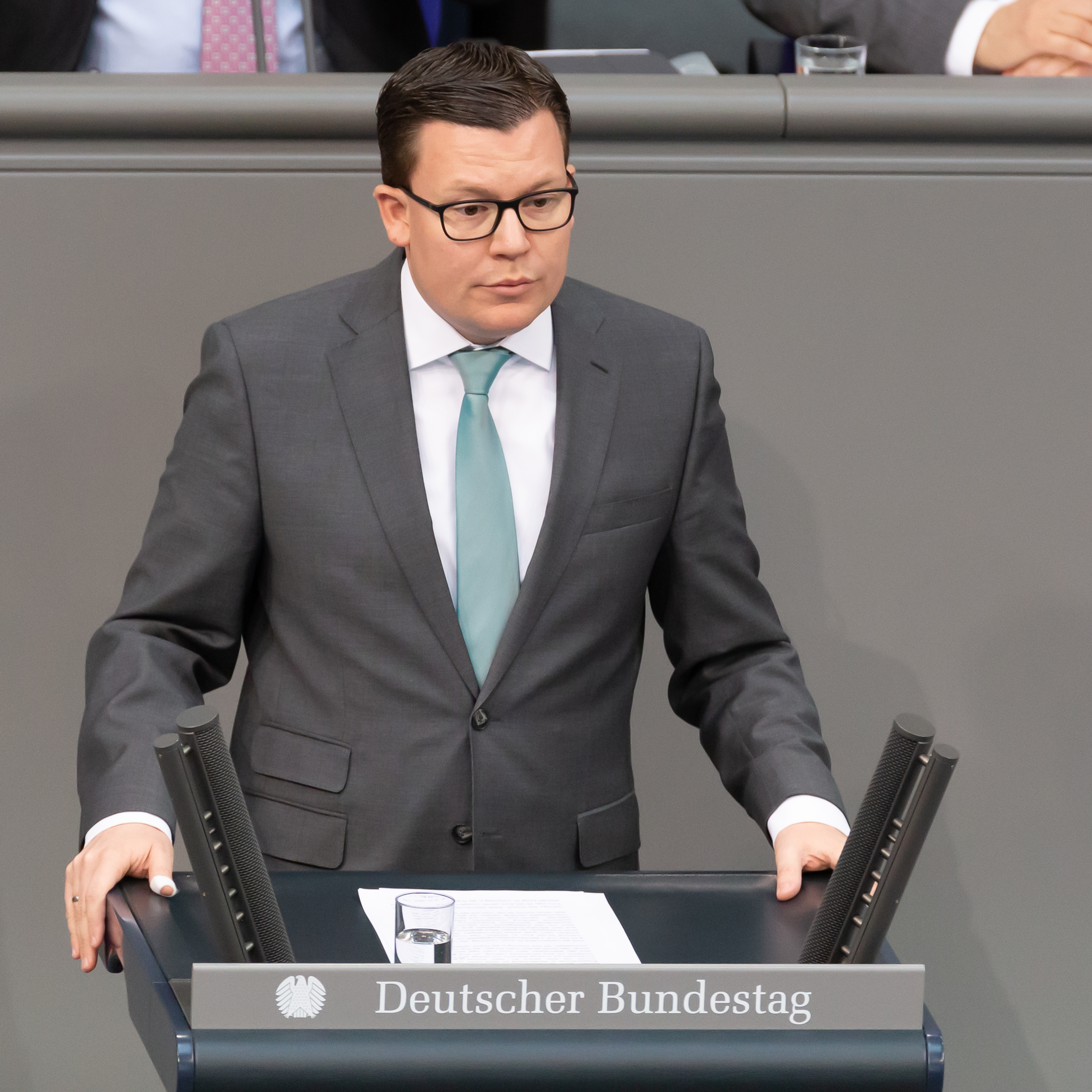 Deutscher Bundestag; Torbjörn Kartes, CDU, spricht im Plenum